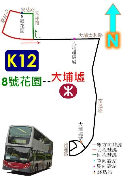 中文（香港）: 港鐵巴士K12線的走線圖